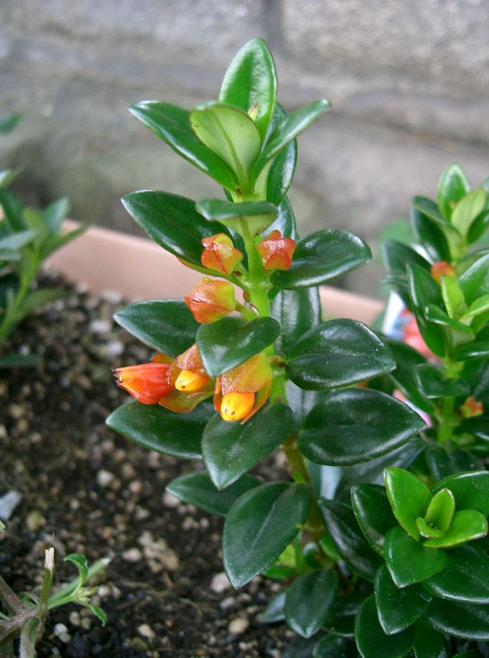 Nematanthus gregarius(=Hypocyrta nummularia)